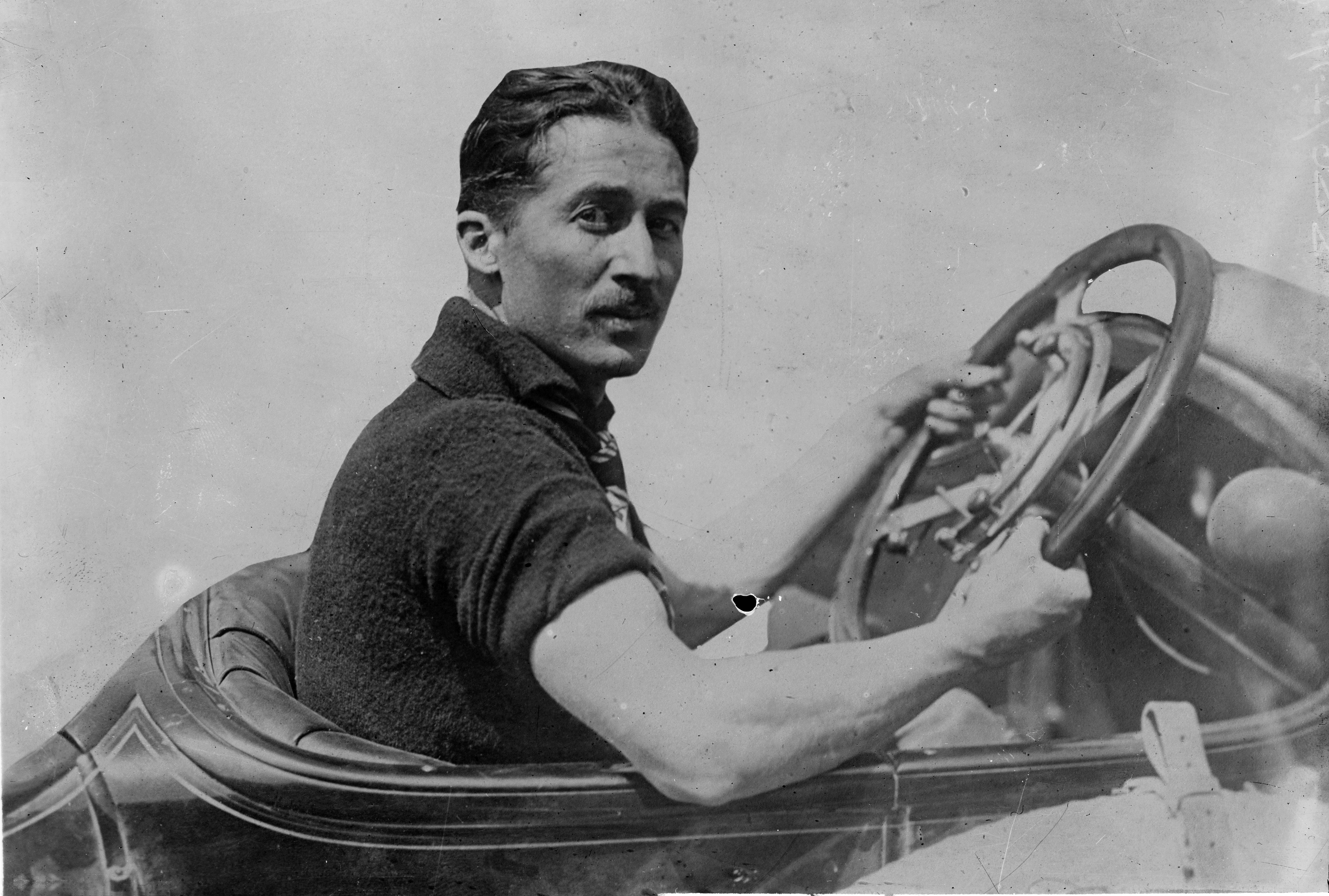 French racecar driver Jules Goux (1885-1965)